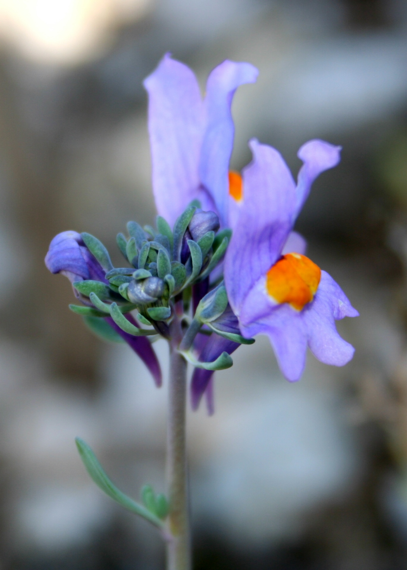 Linaria alpina - Giardino Botanico Alpino "Giangio Lorenzoni", Pian Cansiglio, Tambre d'Alpago (BL), 1000 m s.l.m.